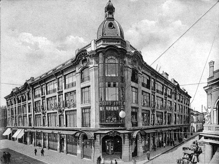 Sucursal de Gath y Chavez en Santiago de Chile a comienzos del siglo XX